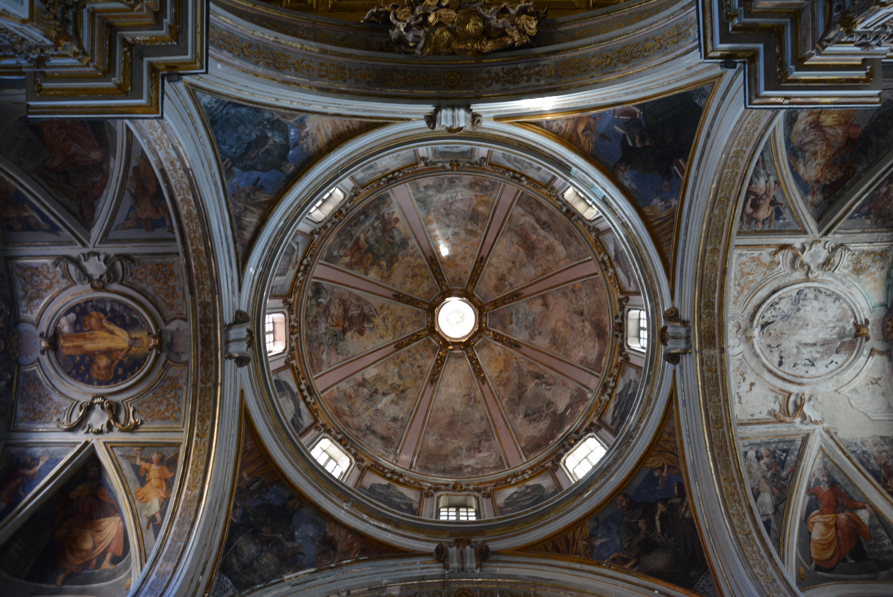 Chiesa di Santa Maria la Nova a Napoli